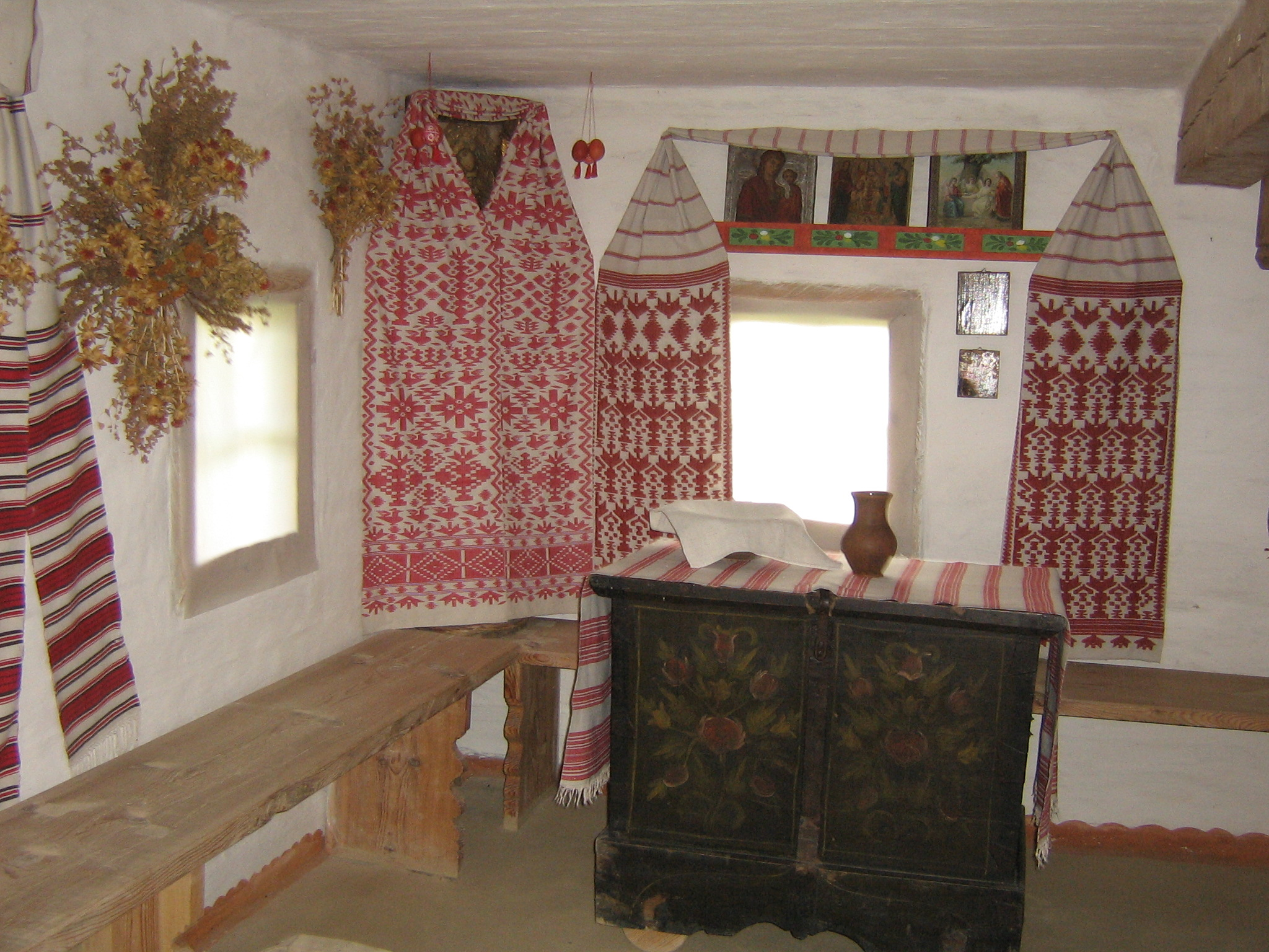 Przykładowe wykorzystanie rusznika.